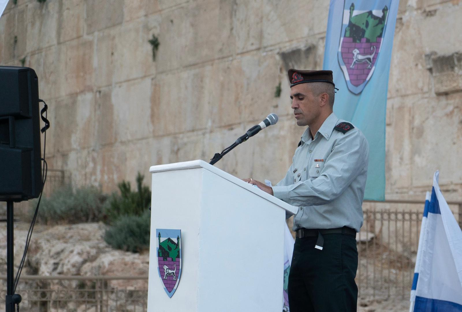 אל"ם אביחי זפרני נכנס היום (רביעי) לתפקידו כמפקד חטיבת "יהודה". טקס החילופים נערך באזור מערת המכפלה, במעמד מפקד פיקוד המרכז, אלוף תמיר ידעי, מפקד אוגדת יהודה ושומרון, תא"ל יניב אלאלוף, מפקדים, לוחמים, בני משפחה, ומוזמנים נוספים.